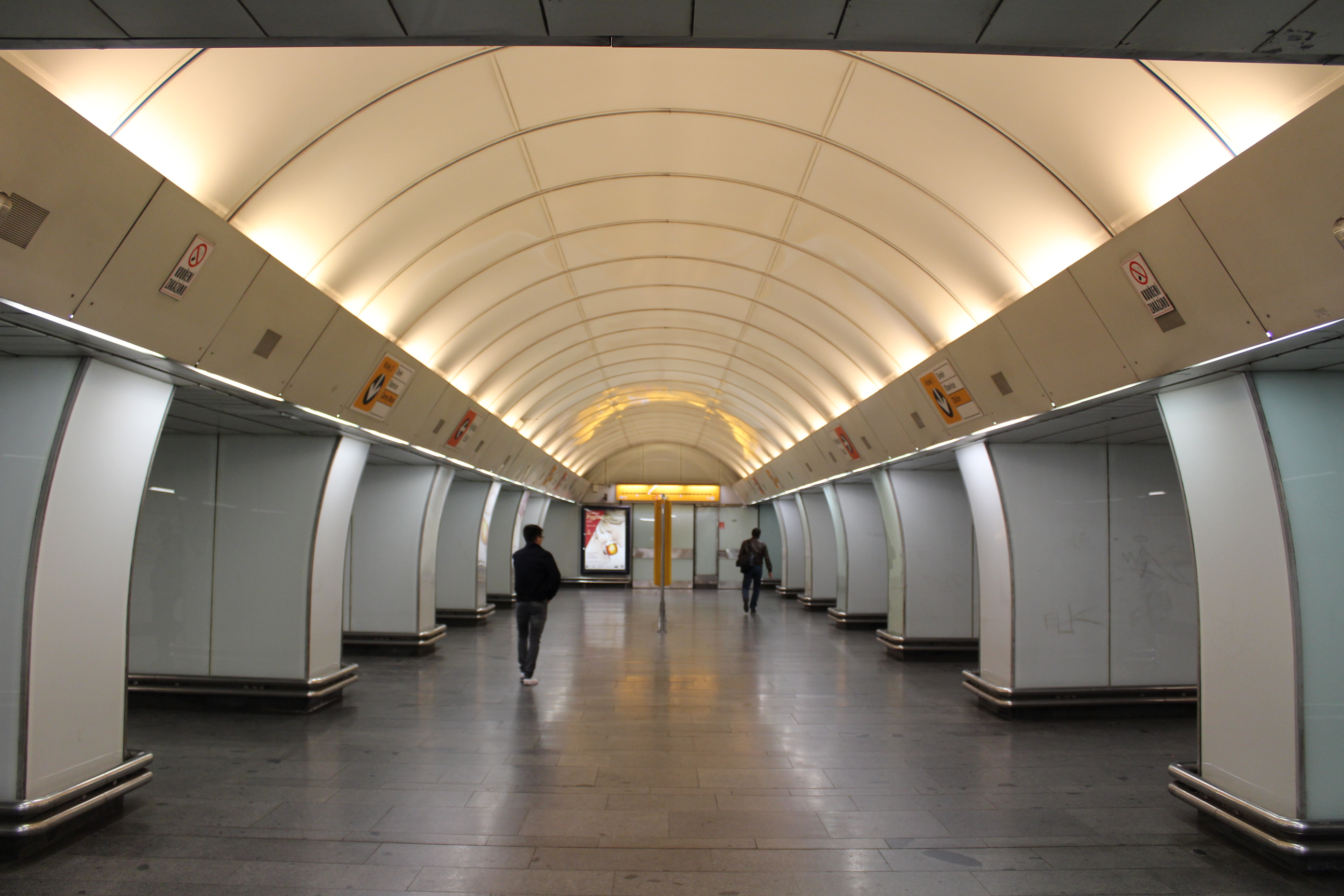 Praha Invalidovna metro